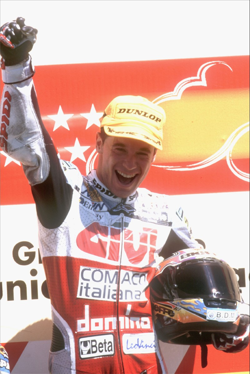 Lucio Cecchinello lors de sa première victoire en Grand Prix 125cc à Madrid en 1998